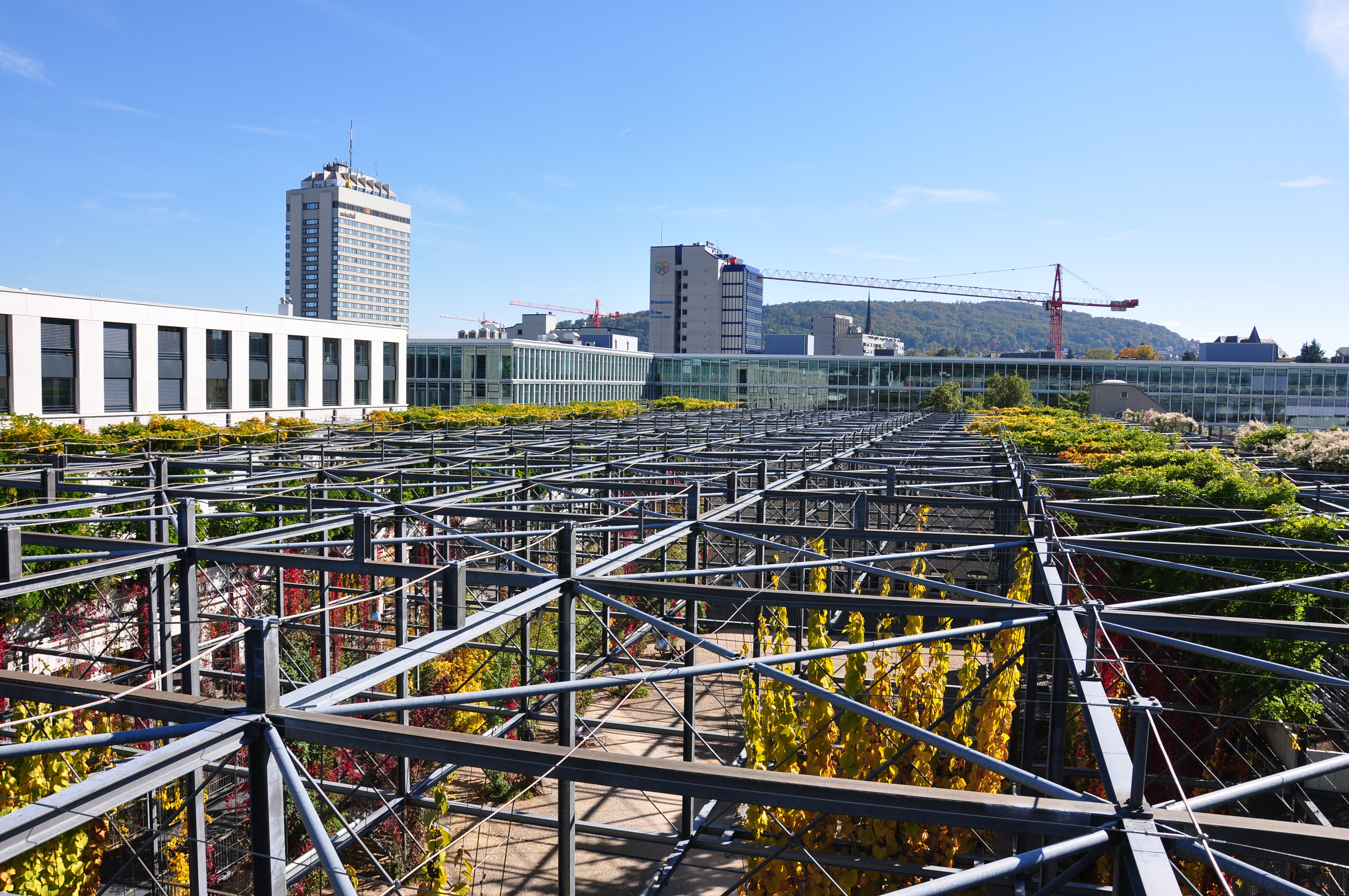 Zürich-Oerlikon in Switzerland, as seen from MFO-Park in Oerlikon, Käferberg, Zürich Oerlikon Swissôtel and Neumarkt shopping mall in the background.